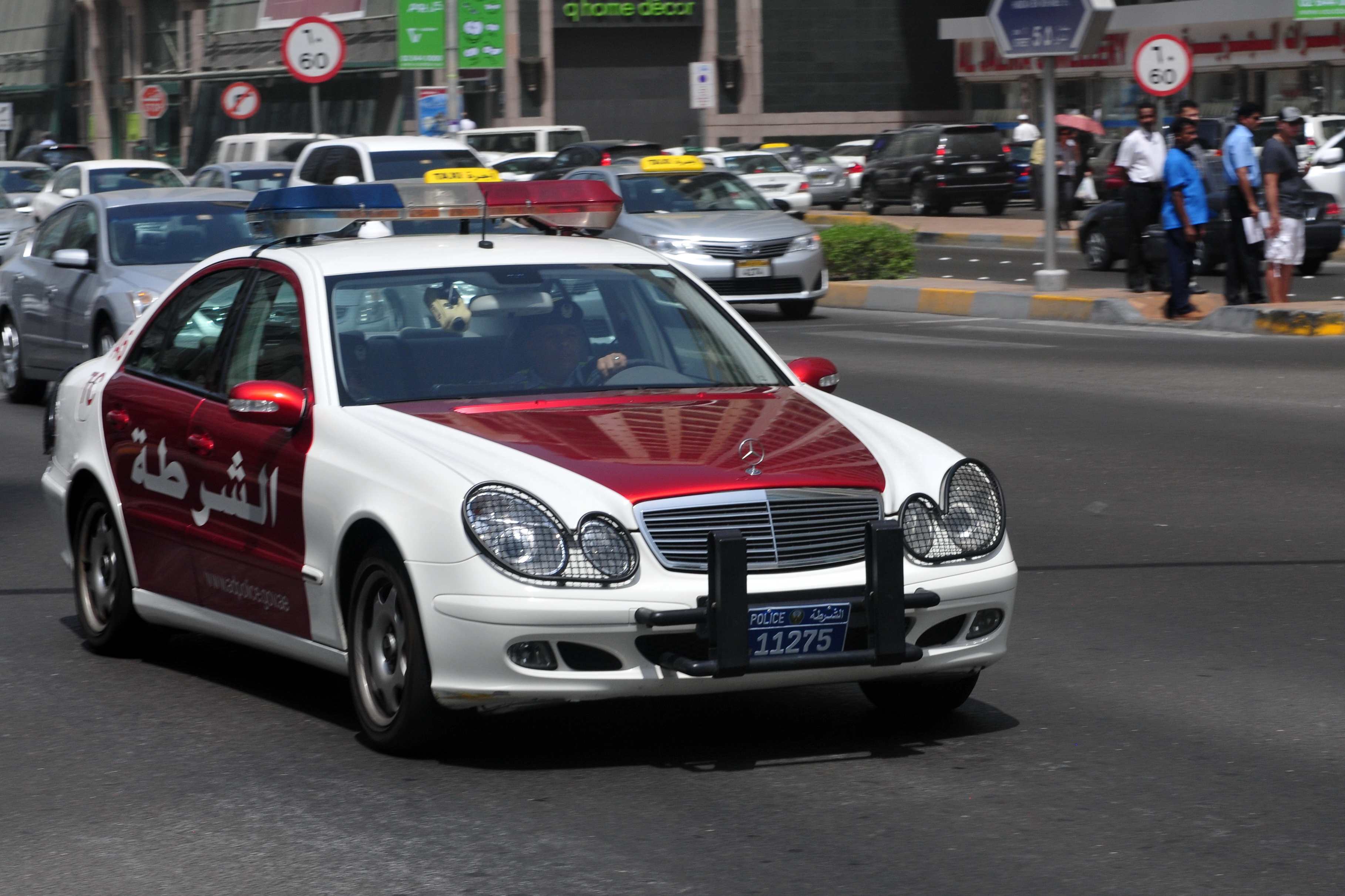 travel to Wikimania 2013: Abu Dhabi